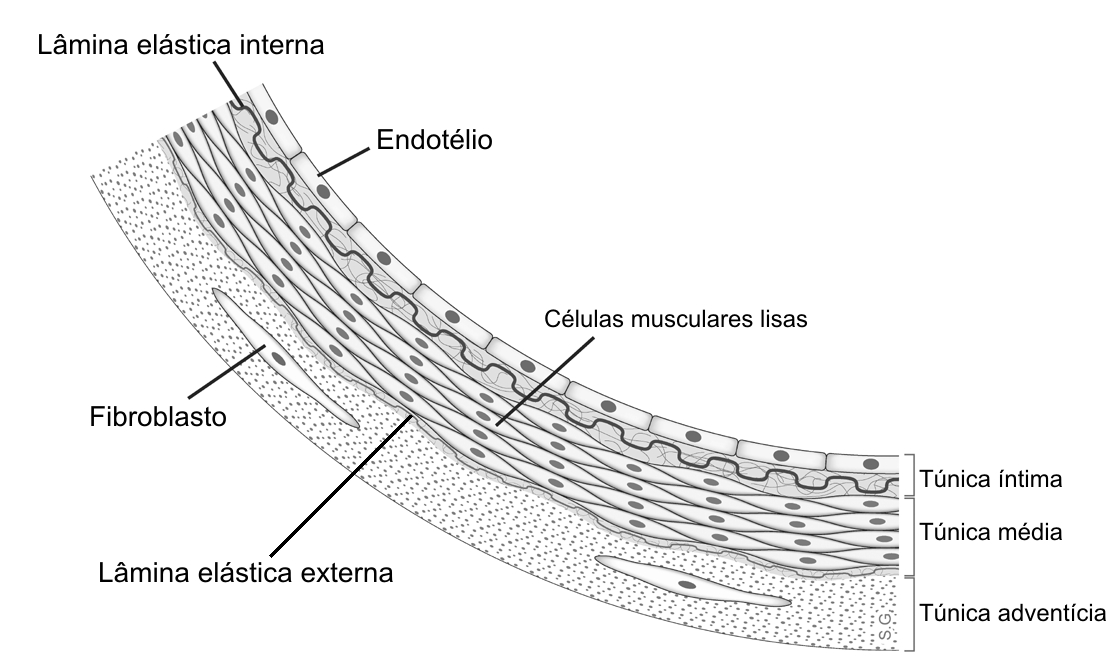 Anatomia da artéria